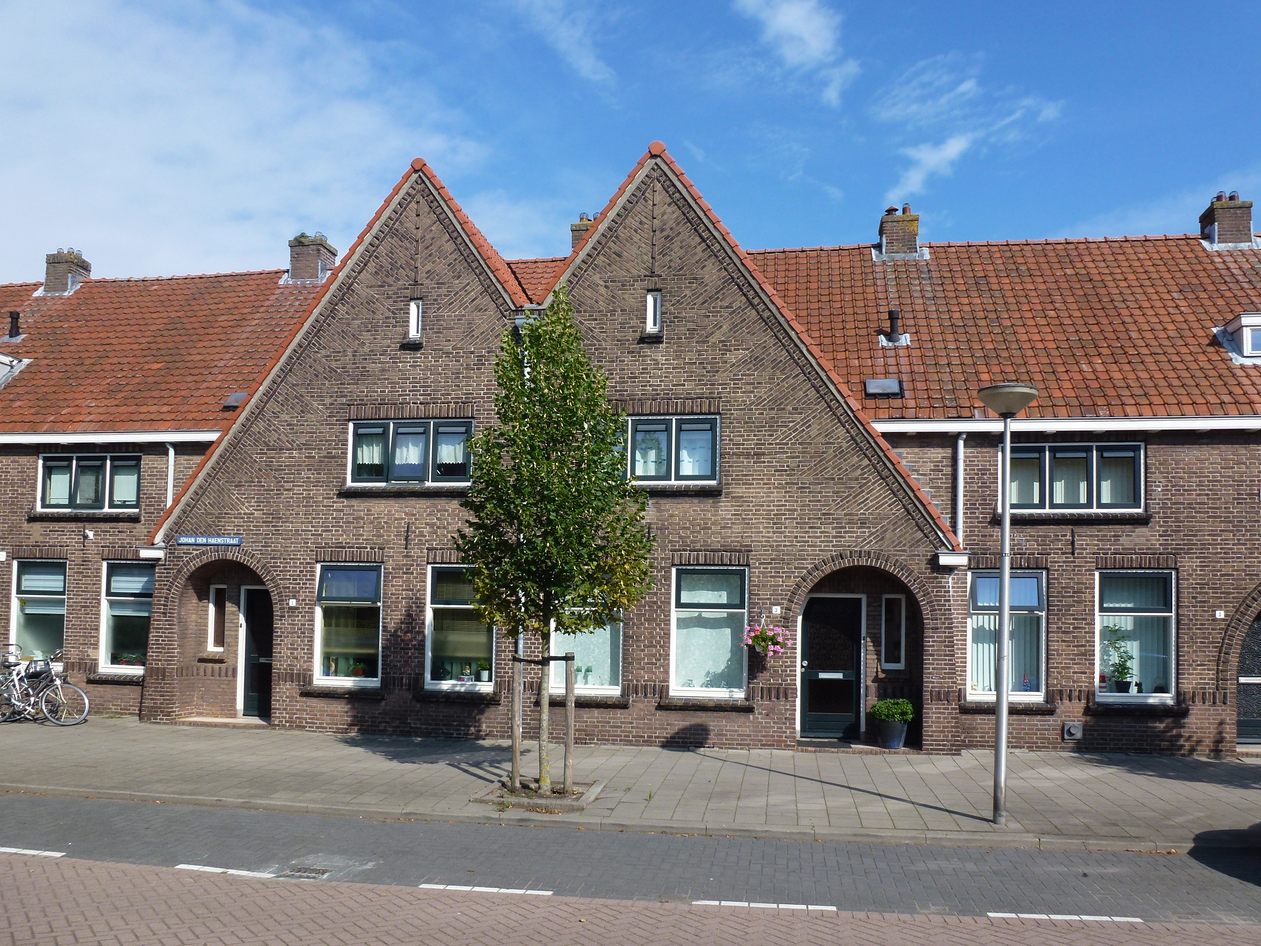 Huizen in de Josephbuurt uit 1921-1923. Huizen met een van bakstenen gemetselde boog bij de ingang van een portiek